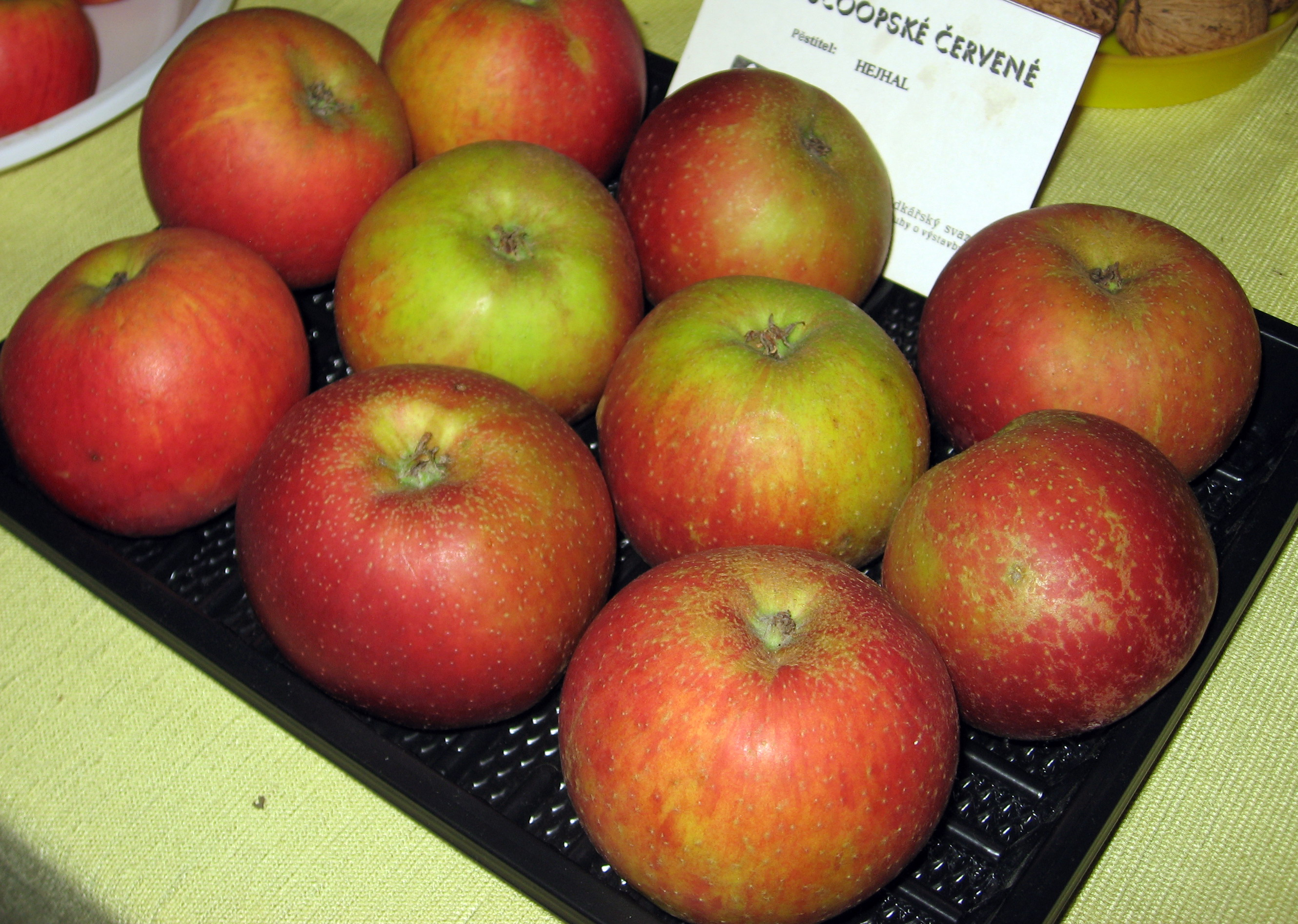 odrůda Boscoopské červené